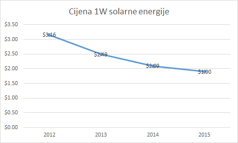 Smanjenje cijene proizvodnje el. energije